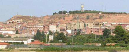 Monte Tambarría (La Plana) en Alfaro Fragmento de una vista general de Alfaro.